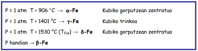 Burdinaren forma alotropikoak